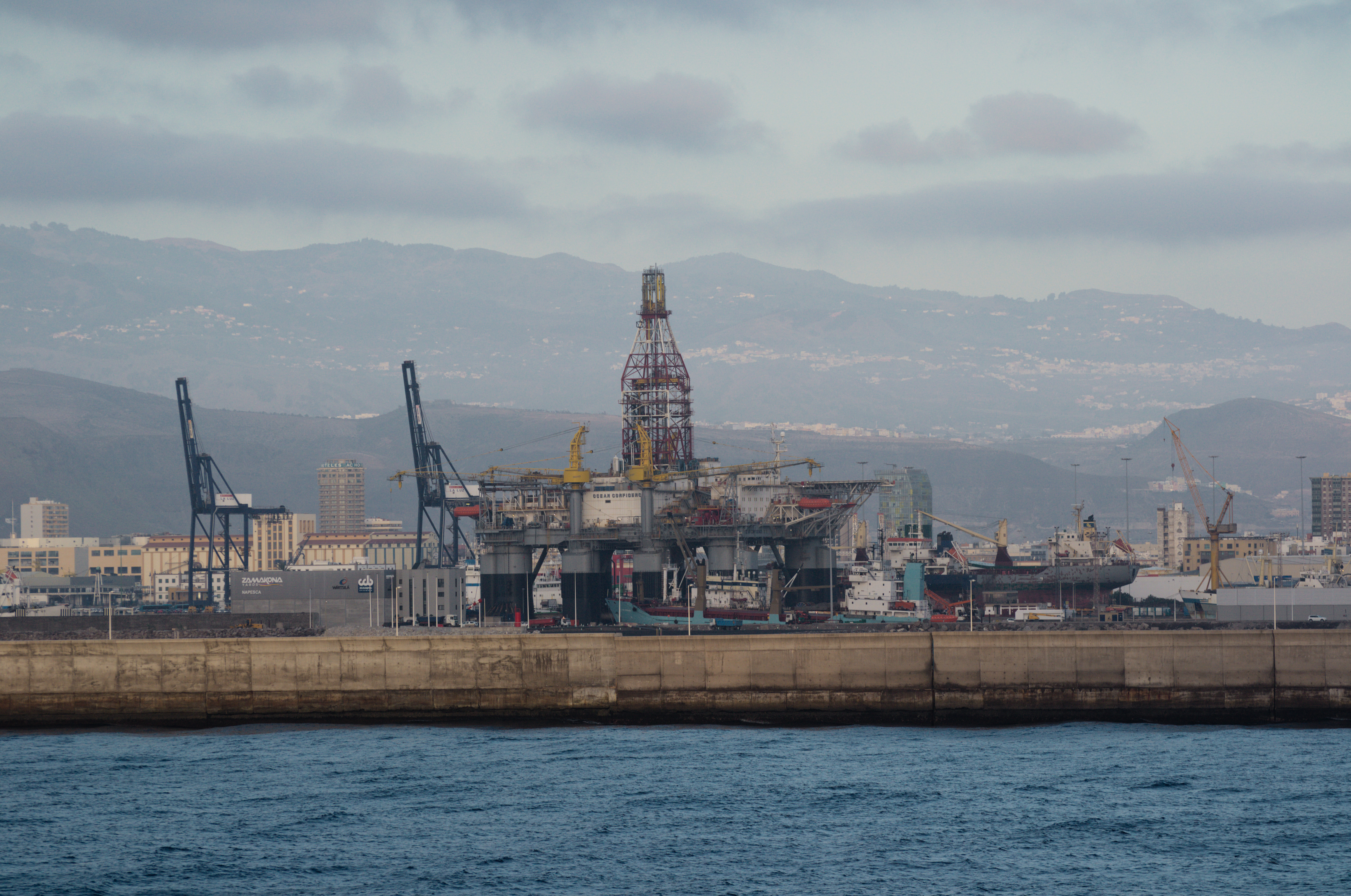 Vista del Puerto de Las Palmas desde un barco.